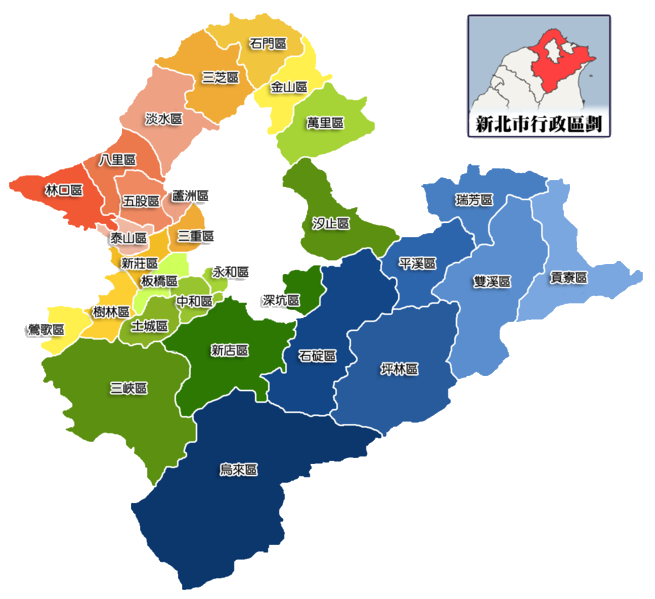 新北市行政區劃